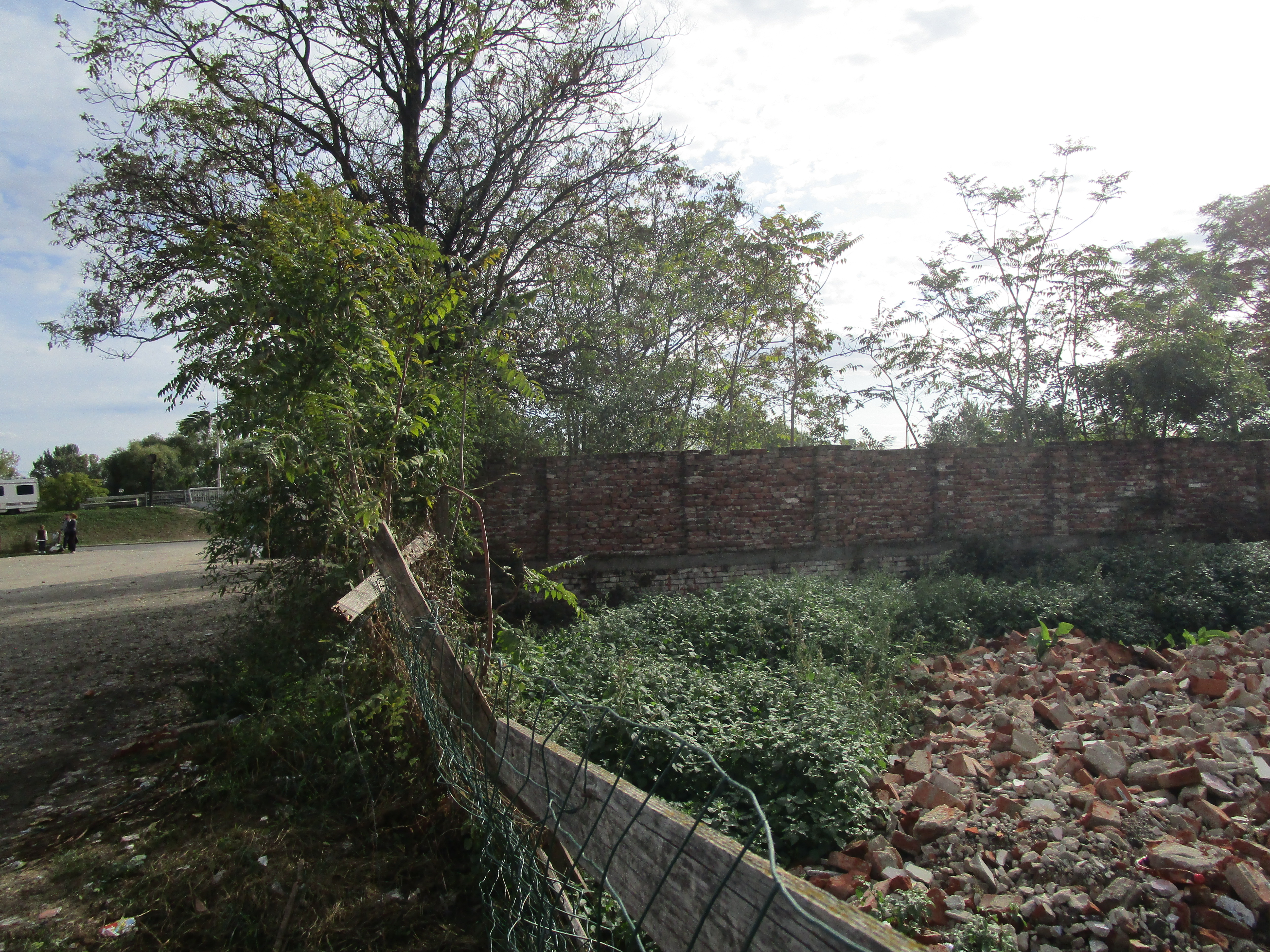 Fragment zid incintă cetate medievală